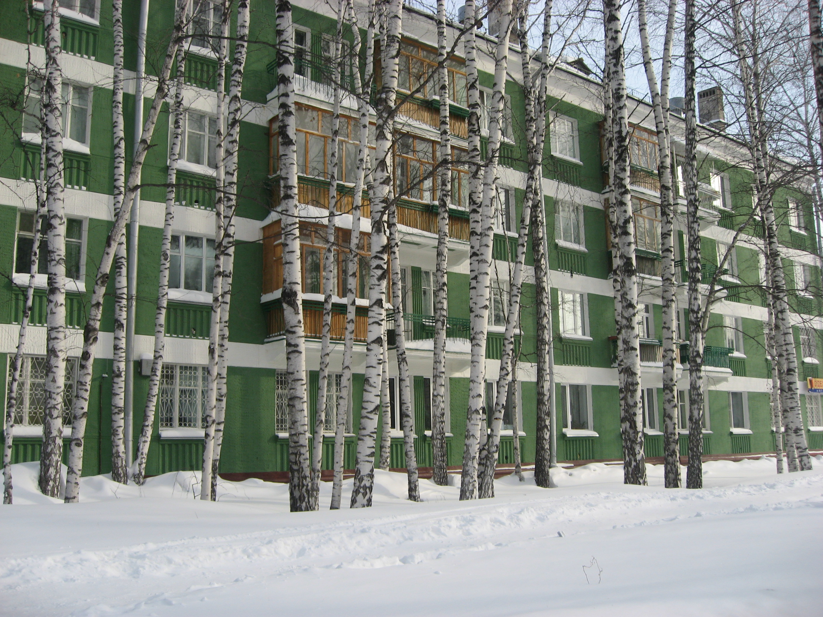 Flat in Akademgorodok